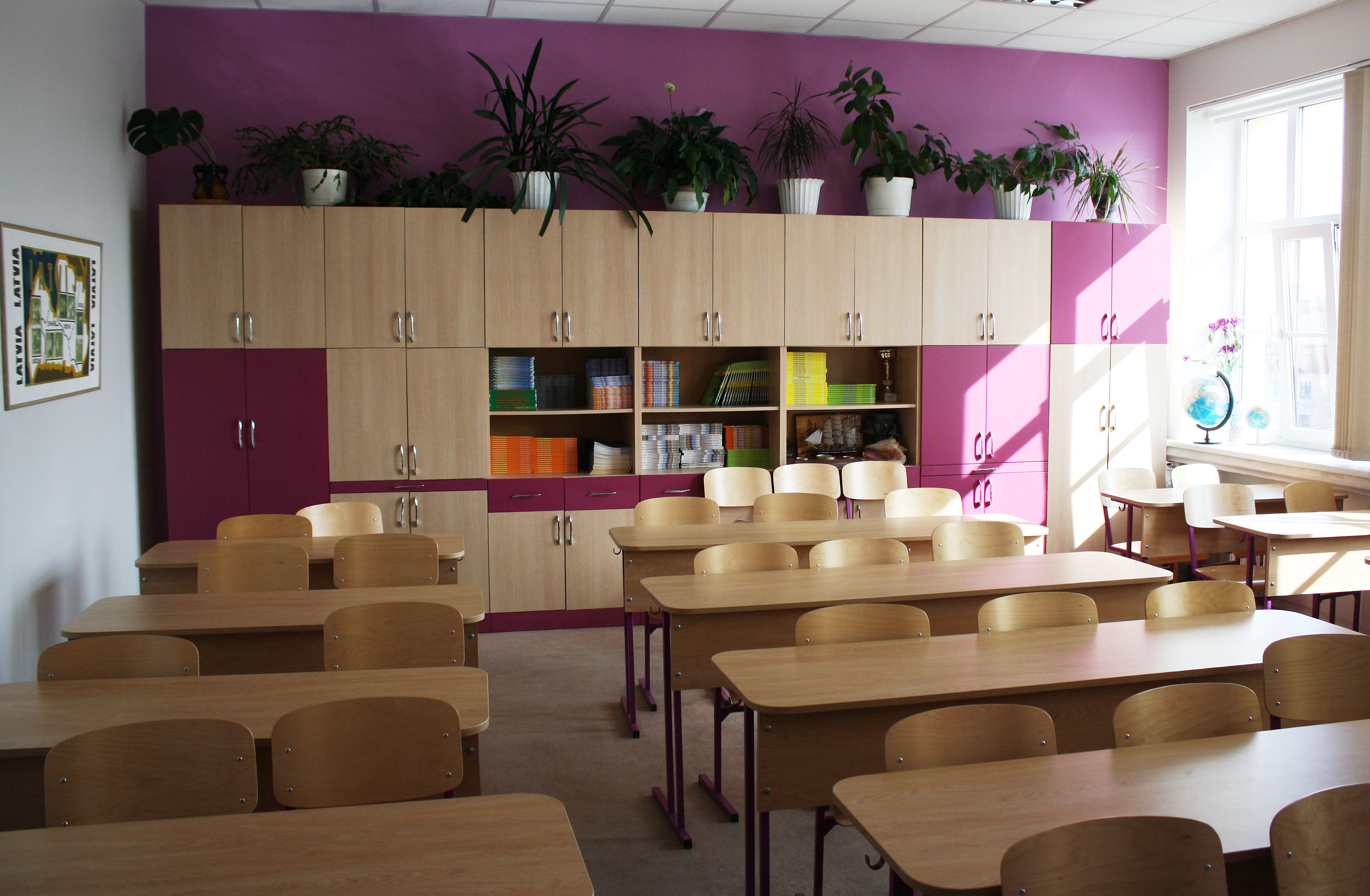 Рига (Латвия) Средняя школа №15 - Обычный класс (парты)